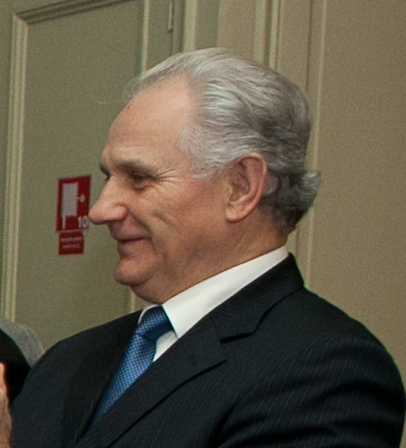 Gunārs Jākobsons